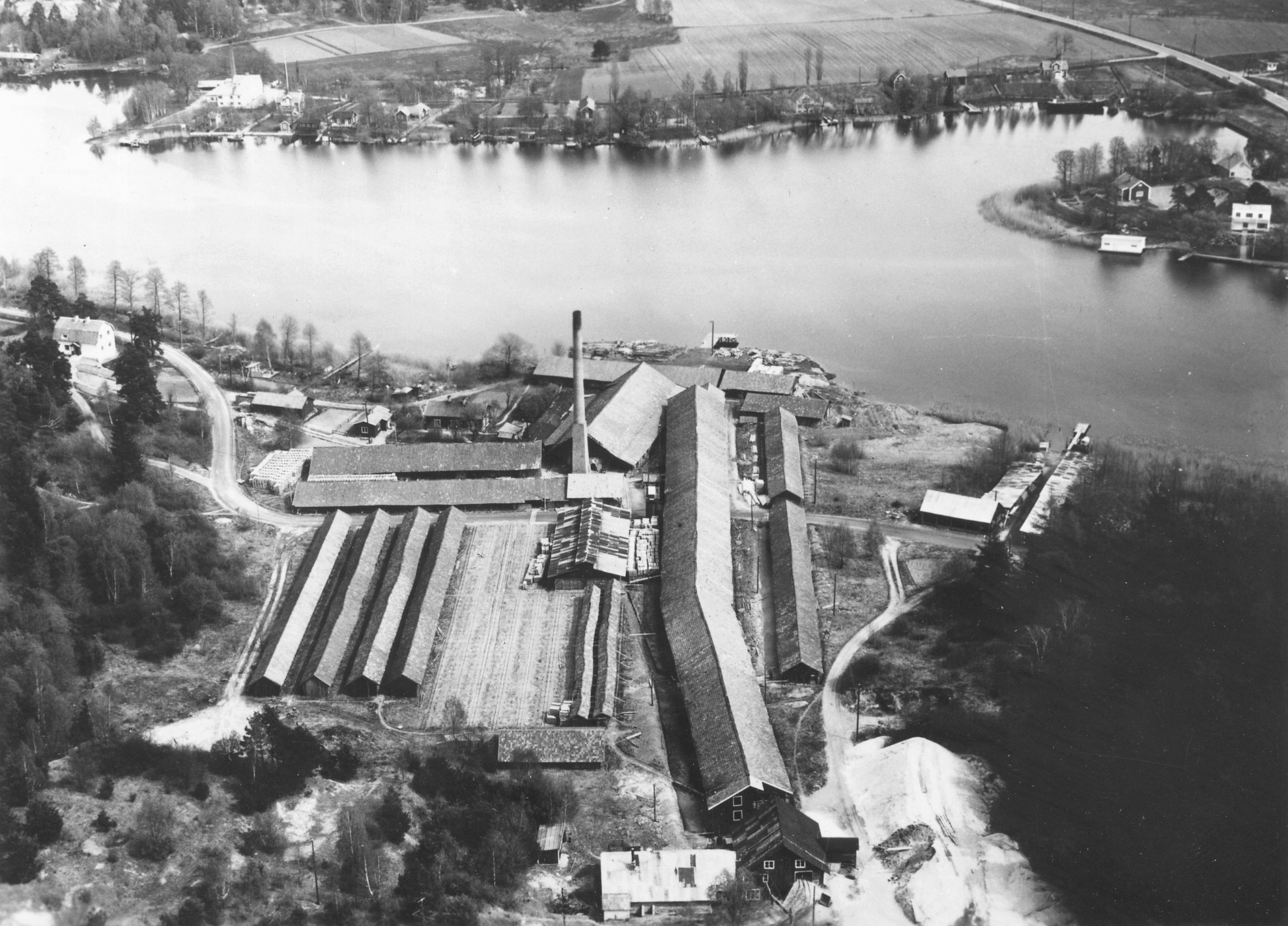 Flygfoto över Fittja tegelbruk